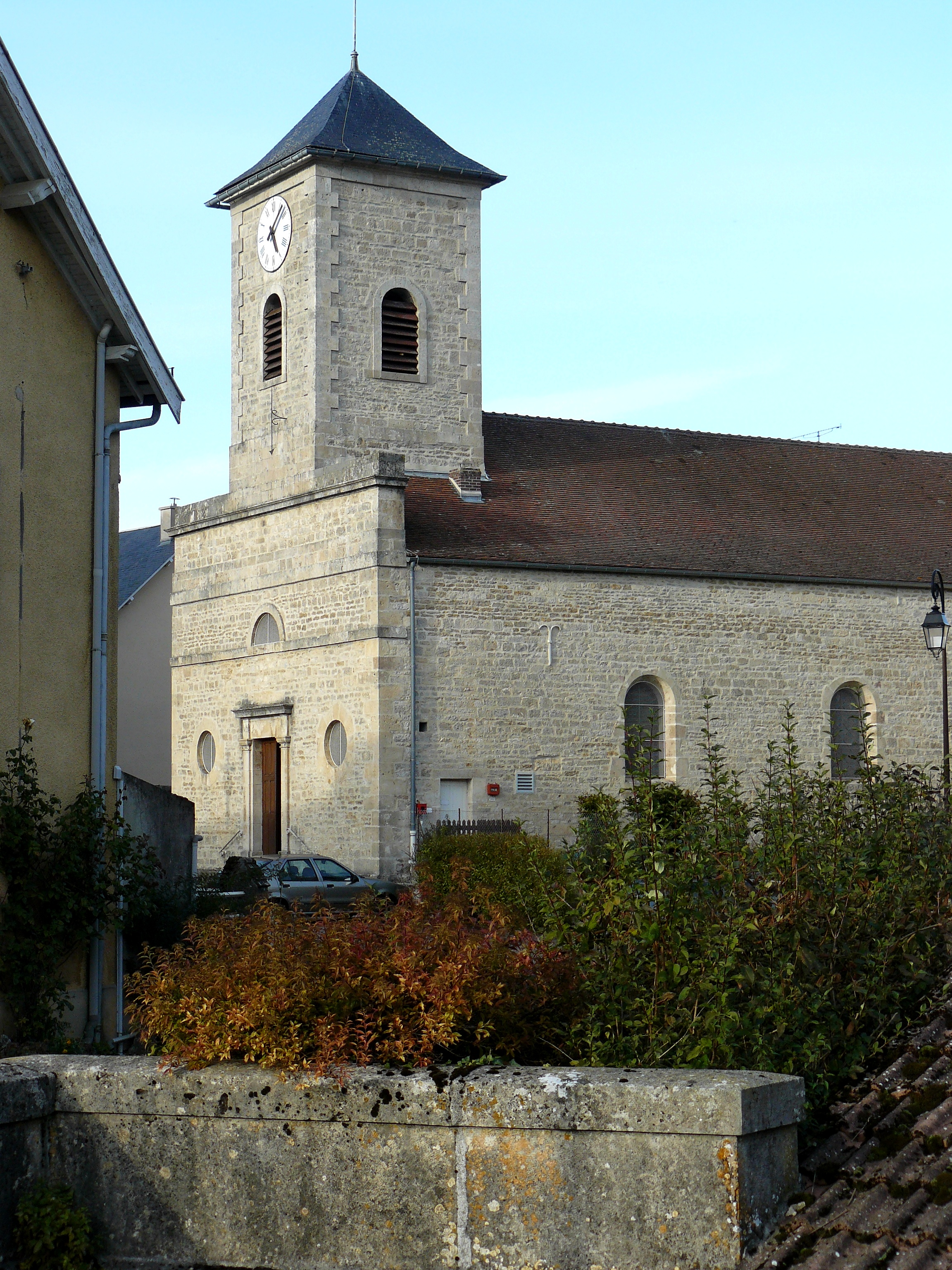 Bligny-le-Sec (Côte-d'Or, France), l'église